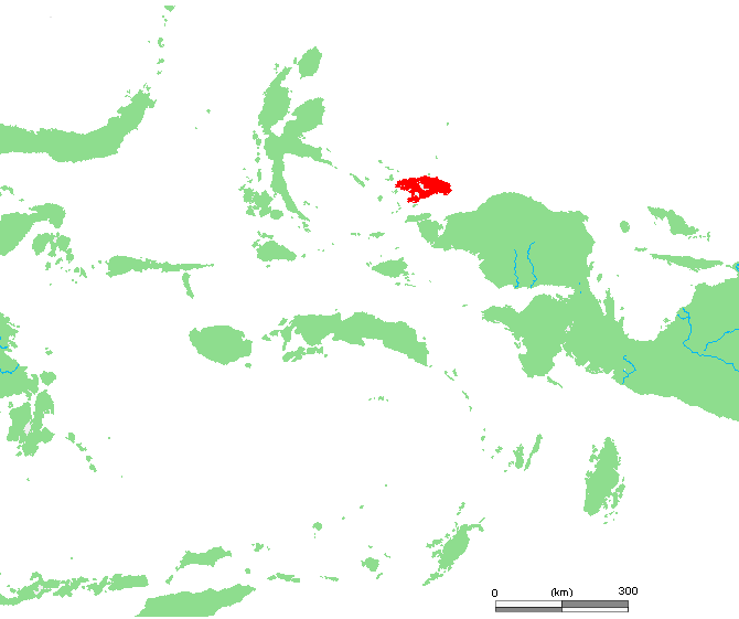 ID Waigeo.PNG